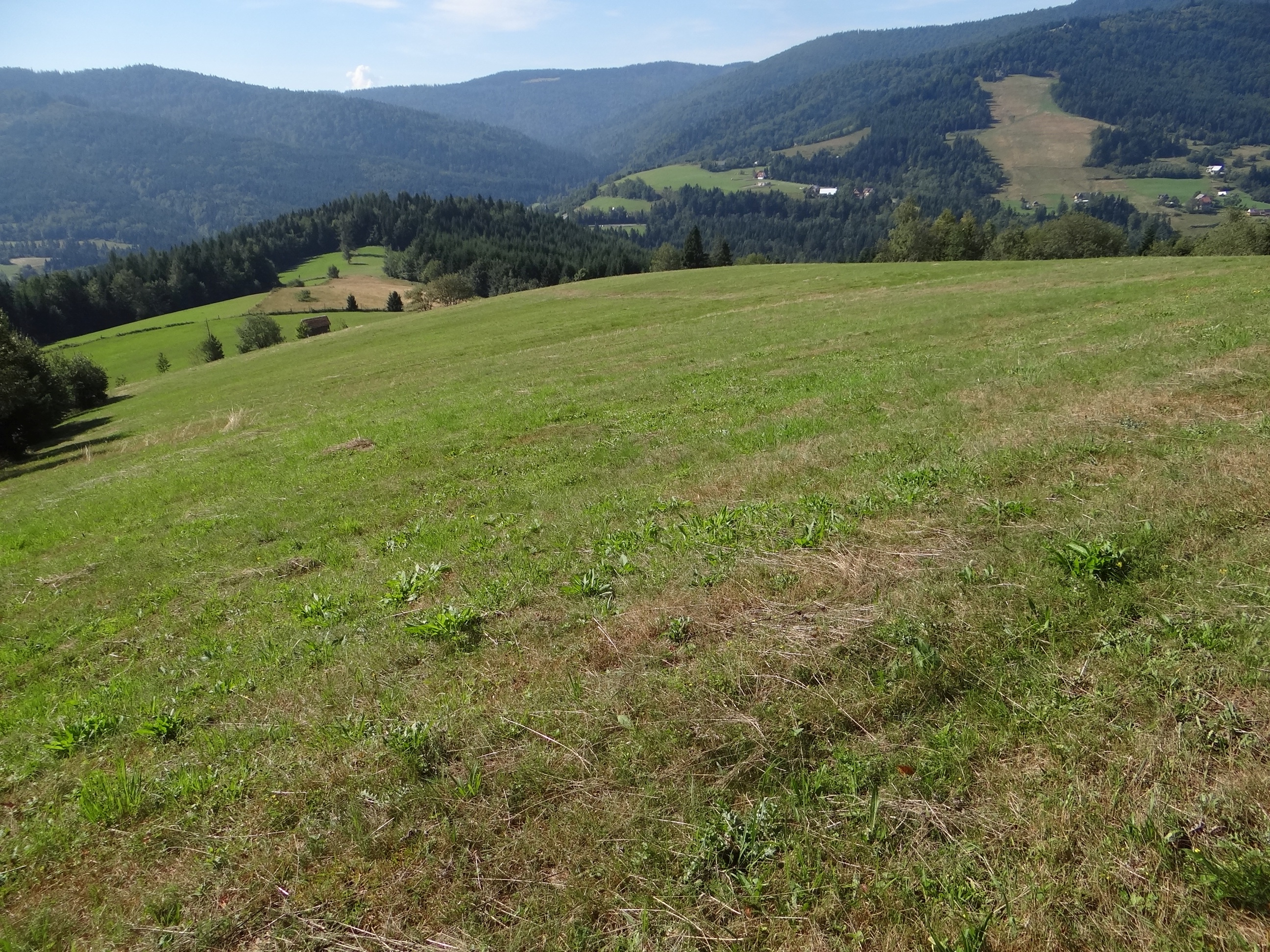 Nowa Polana na Miznówce w Beskidzie Wyspowym (W Lubomierzu)